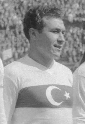 Ahmet Berman